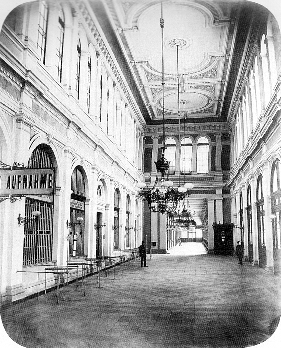 Die Kassenhalle des Wiener Staatsbahnhofes (ab 1918: Ostbahnhof) um 1873